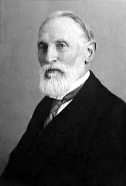 Porträt von Eugen Kittel um 1930